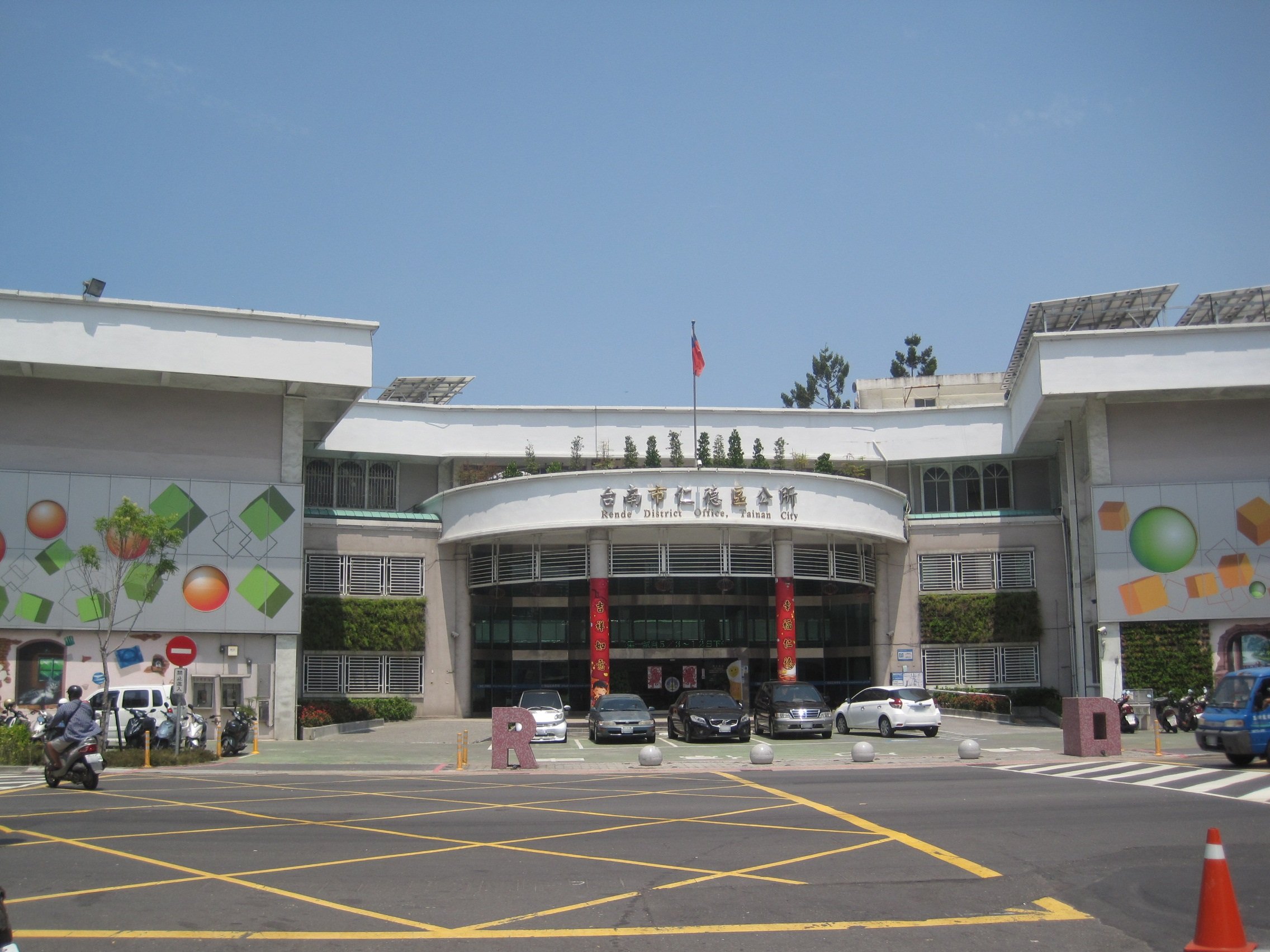 臺南市仁德區公所